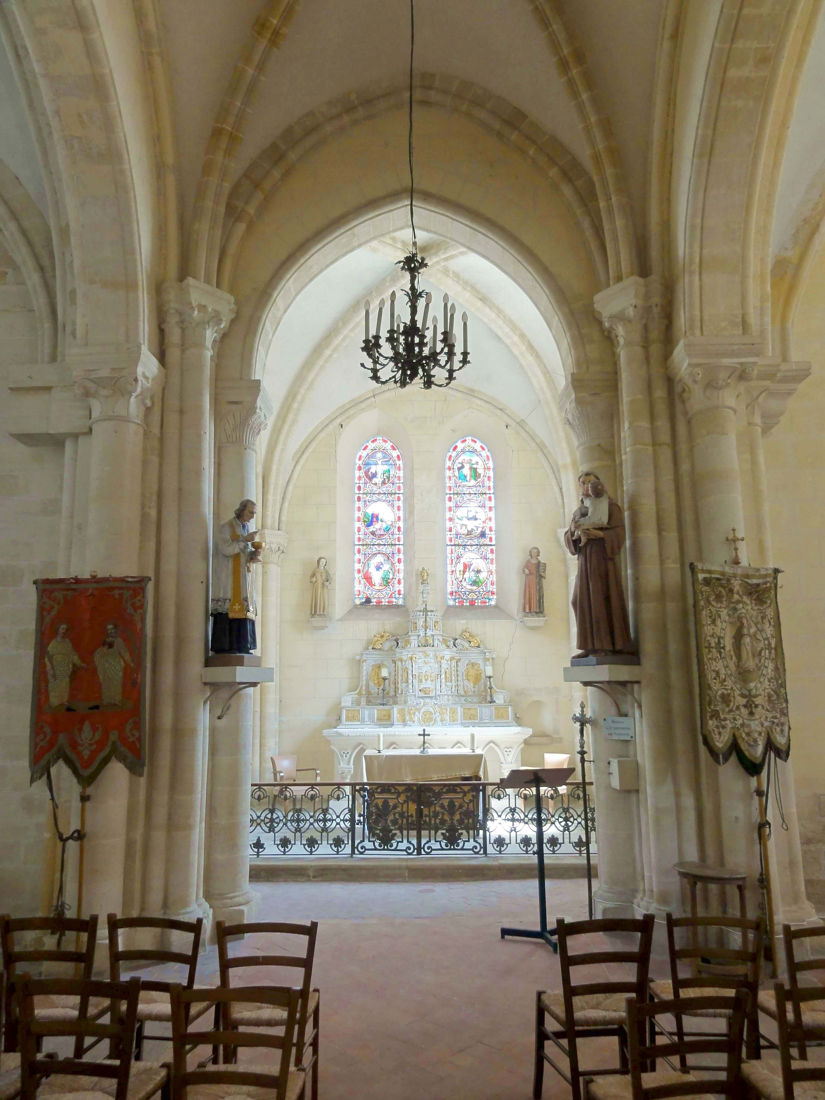 Intérieur de l'église (voir titre).